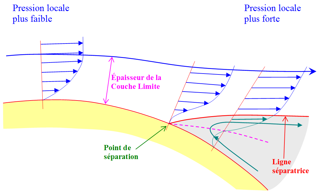 Ce schéma est une amélioration du fameux schéma de 1904 de Prandtl, en ce sens qu'il montre la courbure du corps (laquelle crée le gradient adverse de pression). L'orientation des vitesses de chacun des profils de vitesses est dessinée telle qu'aucune des vitesses du profil le plus à droite ne pénètre dans la zone grisée de recirculation (cette zone représentant un obstacle pour l'écoulement "direct" en provenance de l'avant). Ce même profil de vitesse prend donc en compte la vitesse de particules de la zone de recirculation (vitesses de couleur "glauque"). Il est important de garder en mémoire que l'échelle verticale de ce schéma est beaucoup agrandie (la couche limite sur le corps étant en réalité beaucoup plus fine que représentée ici).